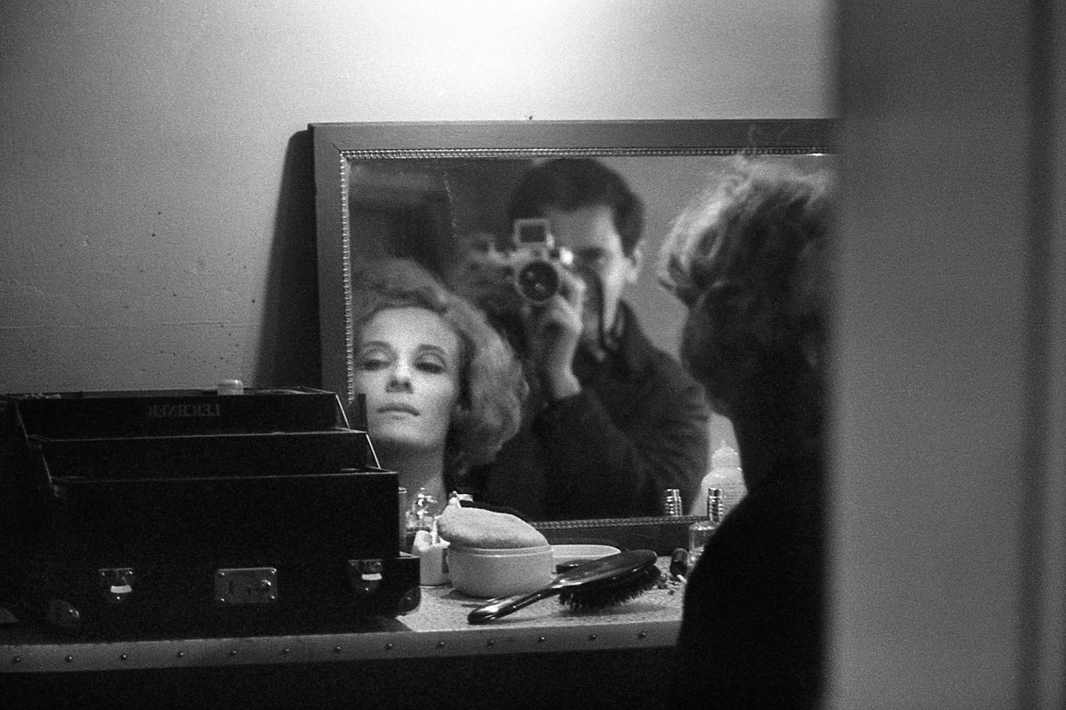 Delphine Seyrig en 1965